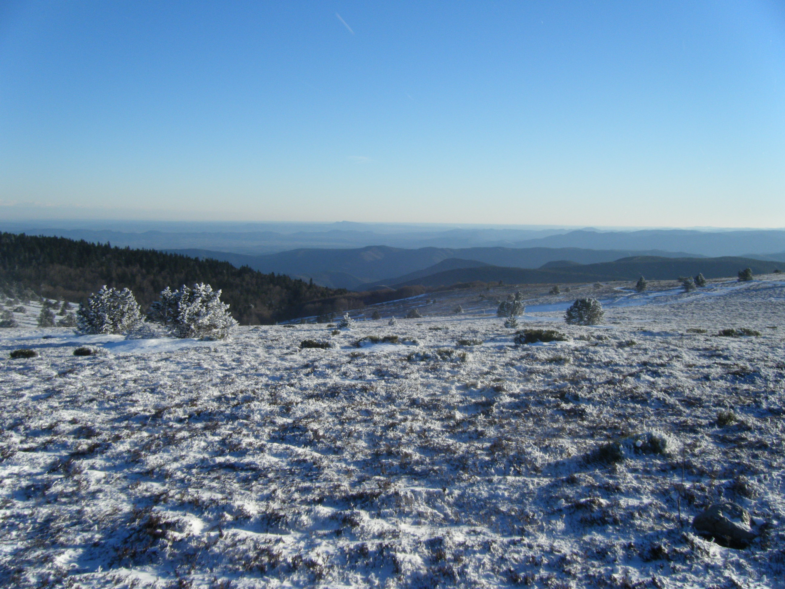 vue sur la vallée depuis le sommet du Tanargue.